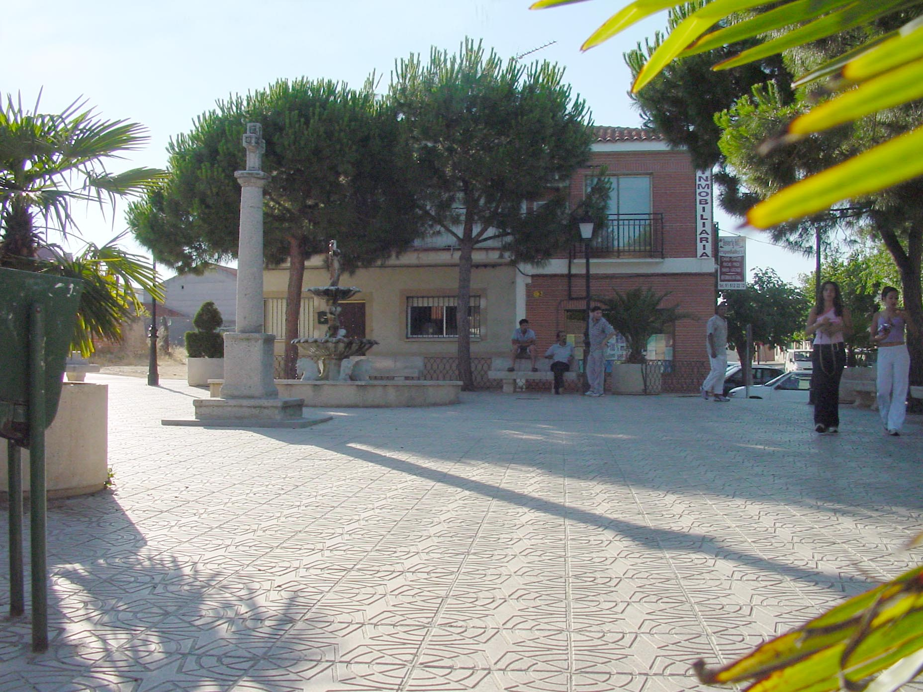 Plaza de El Álamo.